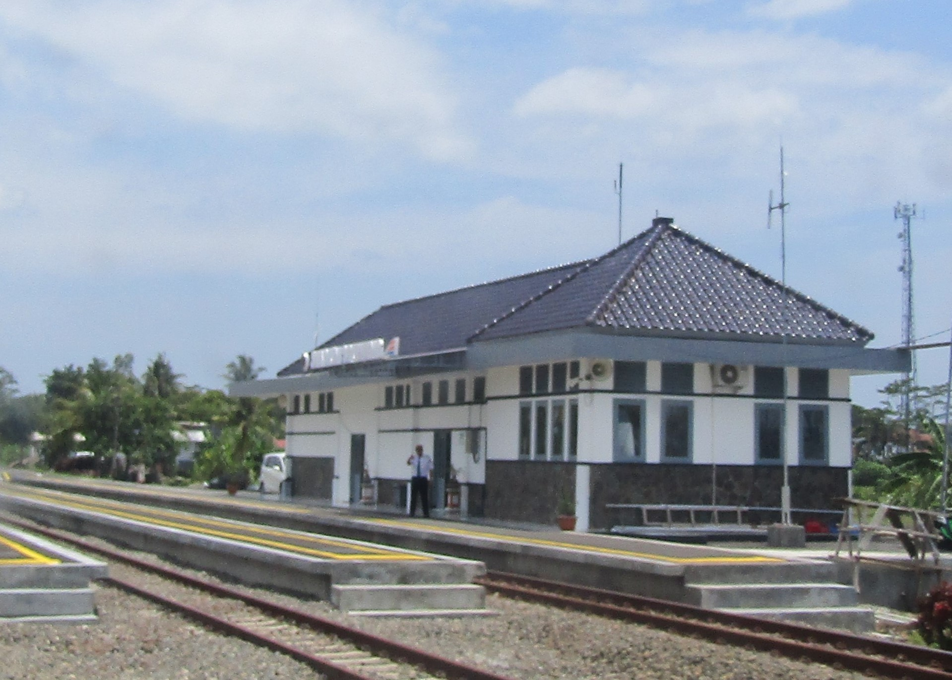 Bangunan baru Stasiun Sruweng, 2020